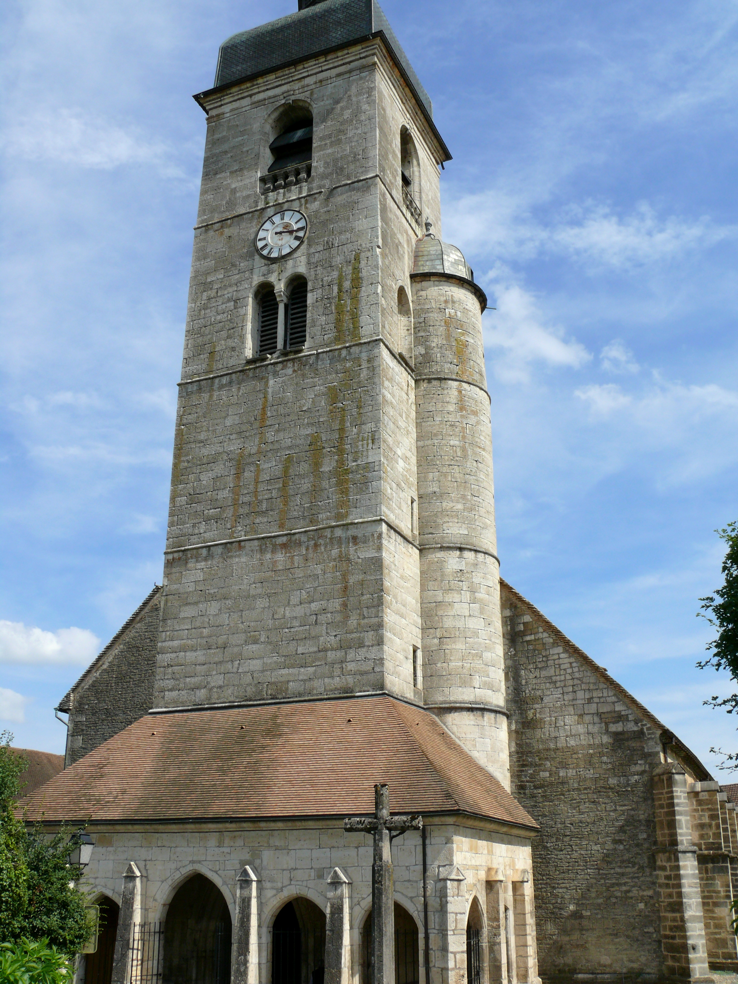 Ornans - Eglise Saint-Laurent - Tour-clocher et porche